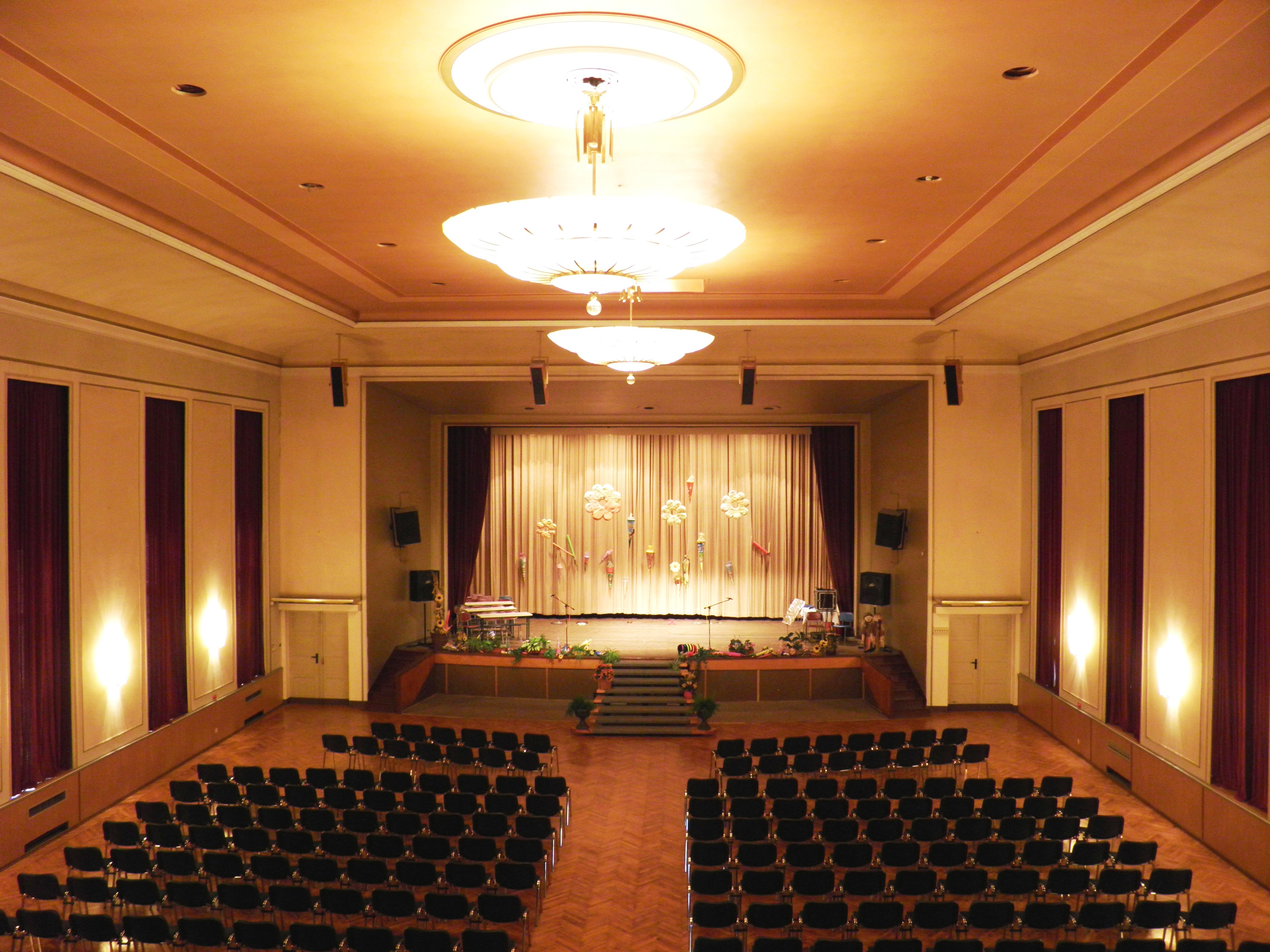 Kulturhaus Plessa (culture house Plessa, hall after renovation with volunteers, 2010-08)